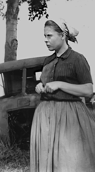 Zentralbild-DEFA frie-zie 20.9.1968 Berlin: "Wege übers Land" - Szenefoto Gertrud Habersaat (Ursula Karusseit) und der Kommunist Willy Hoyer (Manfred Krug) spielen Hauptrollen in Helmut Sakowskis dramatischem Fernsehroman, der zur Zeit in fünf Teilen über den Bildschirm geht. Regie in diesem speziell für das Fernsehen geschriebene Werk führte Martin Eckermann."